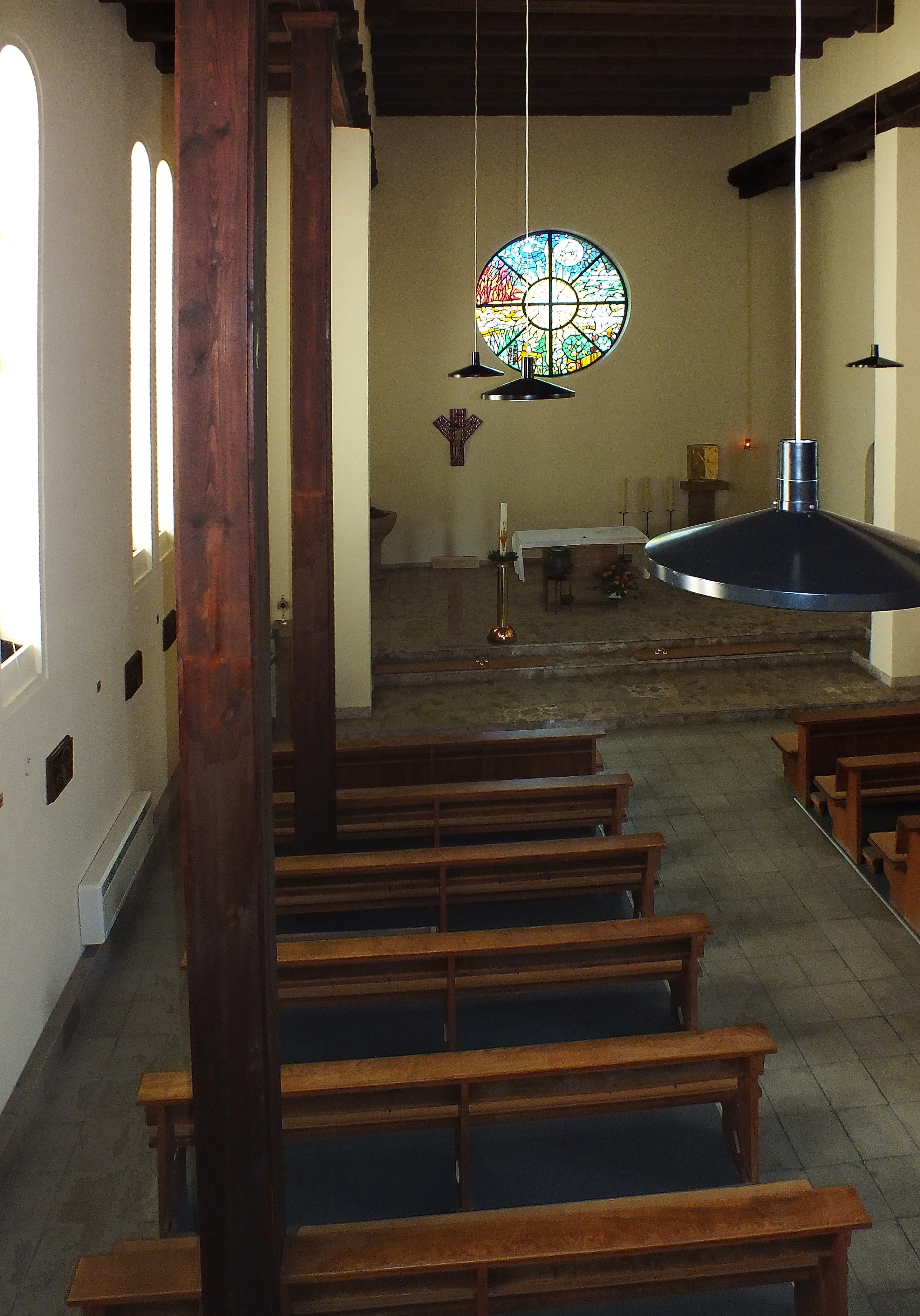 Berlin-Friedrichshagen: katholische Kapelle St. Franziskus, Ansicht von Nordwest